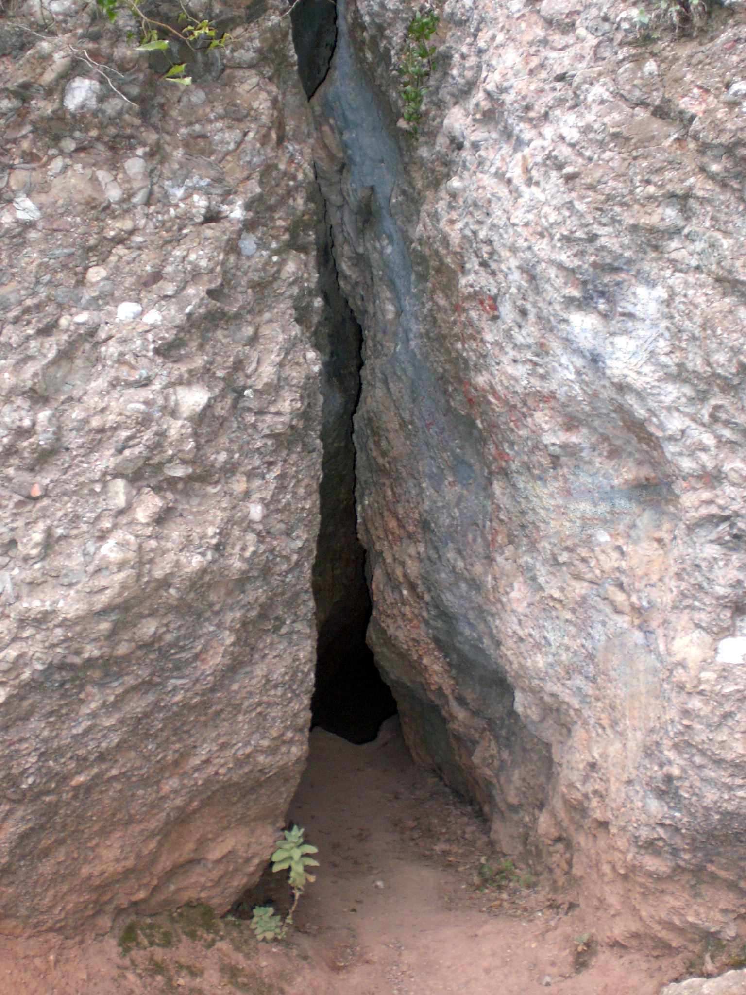 Cova del Manel (cueva del Manel), Matadepera, Barcelona (España).